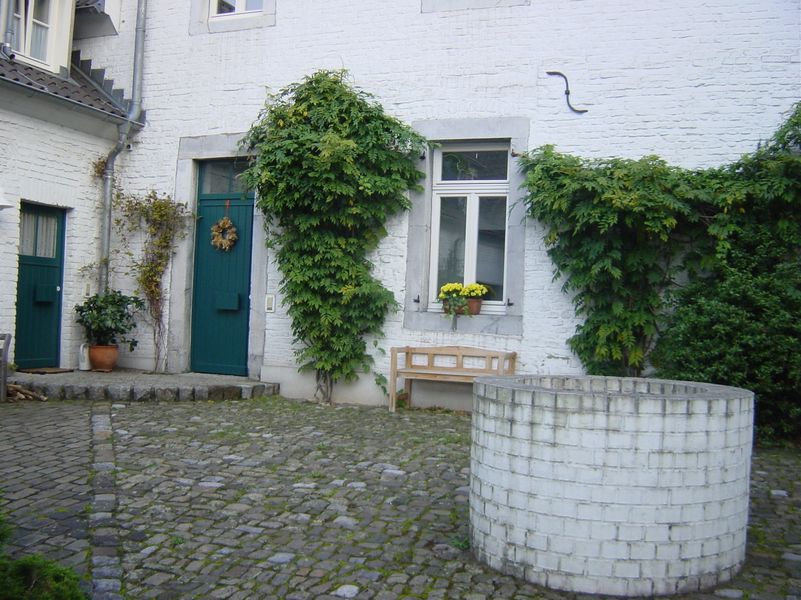 Gut Überhaaren, Innenansicht des Hofes